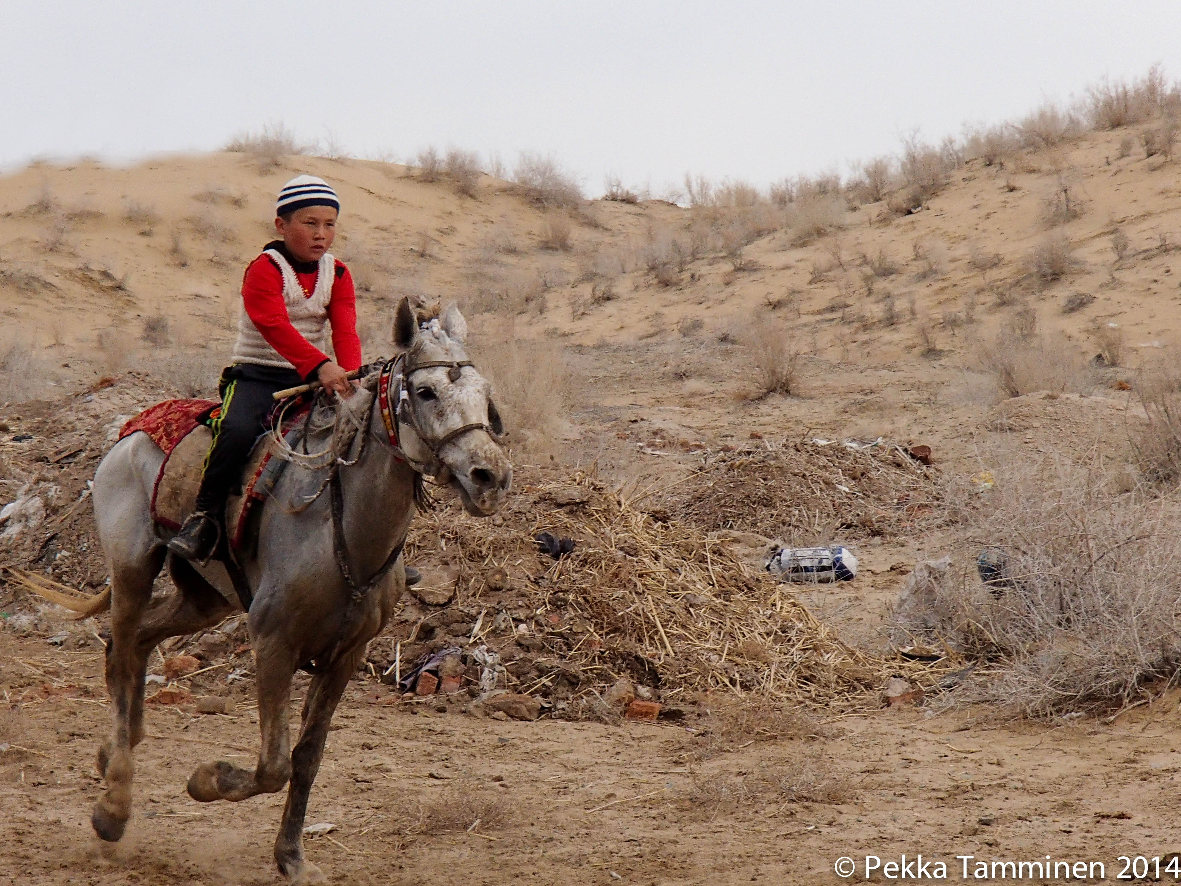 Karakalpak boy in Taxtako'pir, Karakalpakstan, Uzbekistan